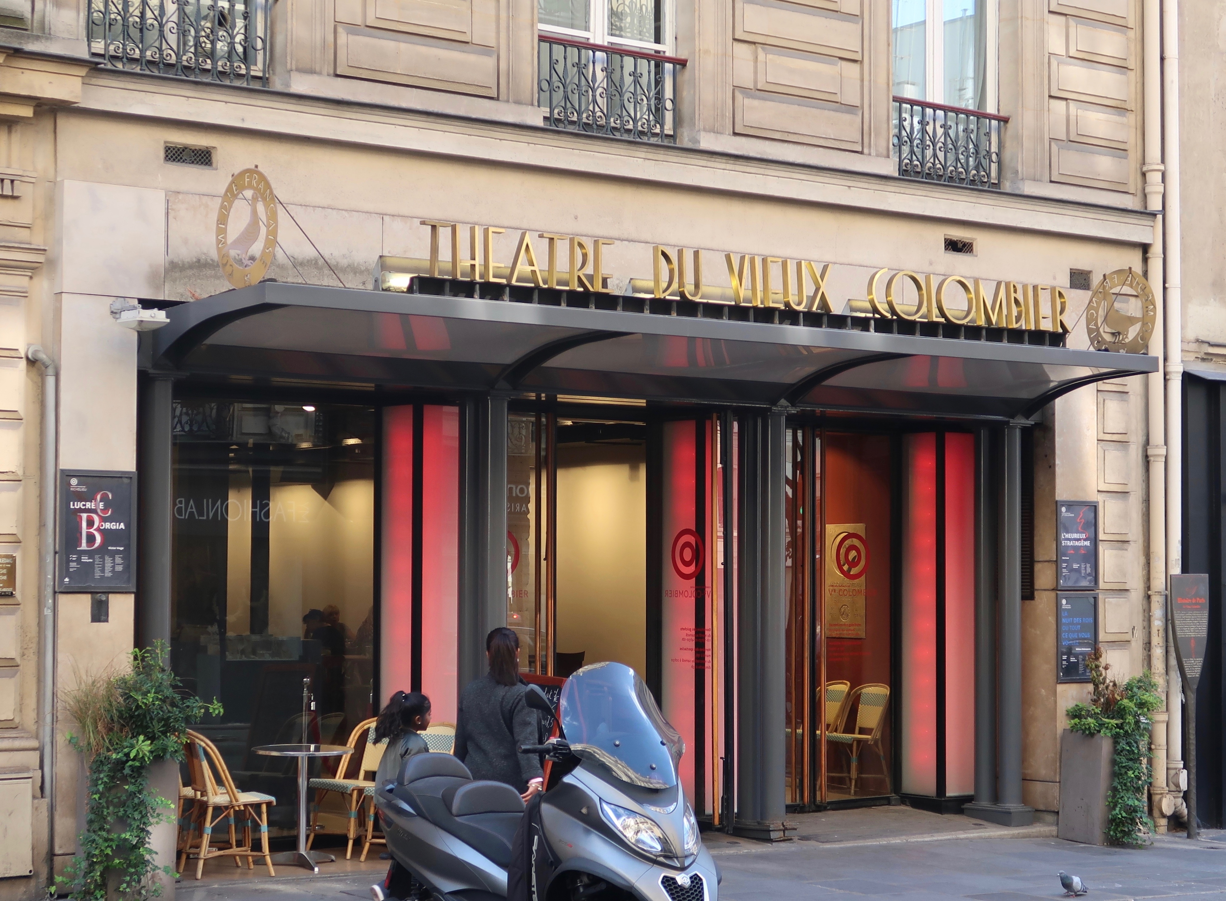 Théâtre du Vieux-Colombier, 21 rue du Vieux-Colombier (Paris 6e).